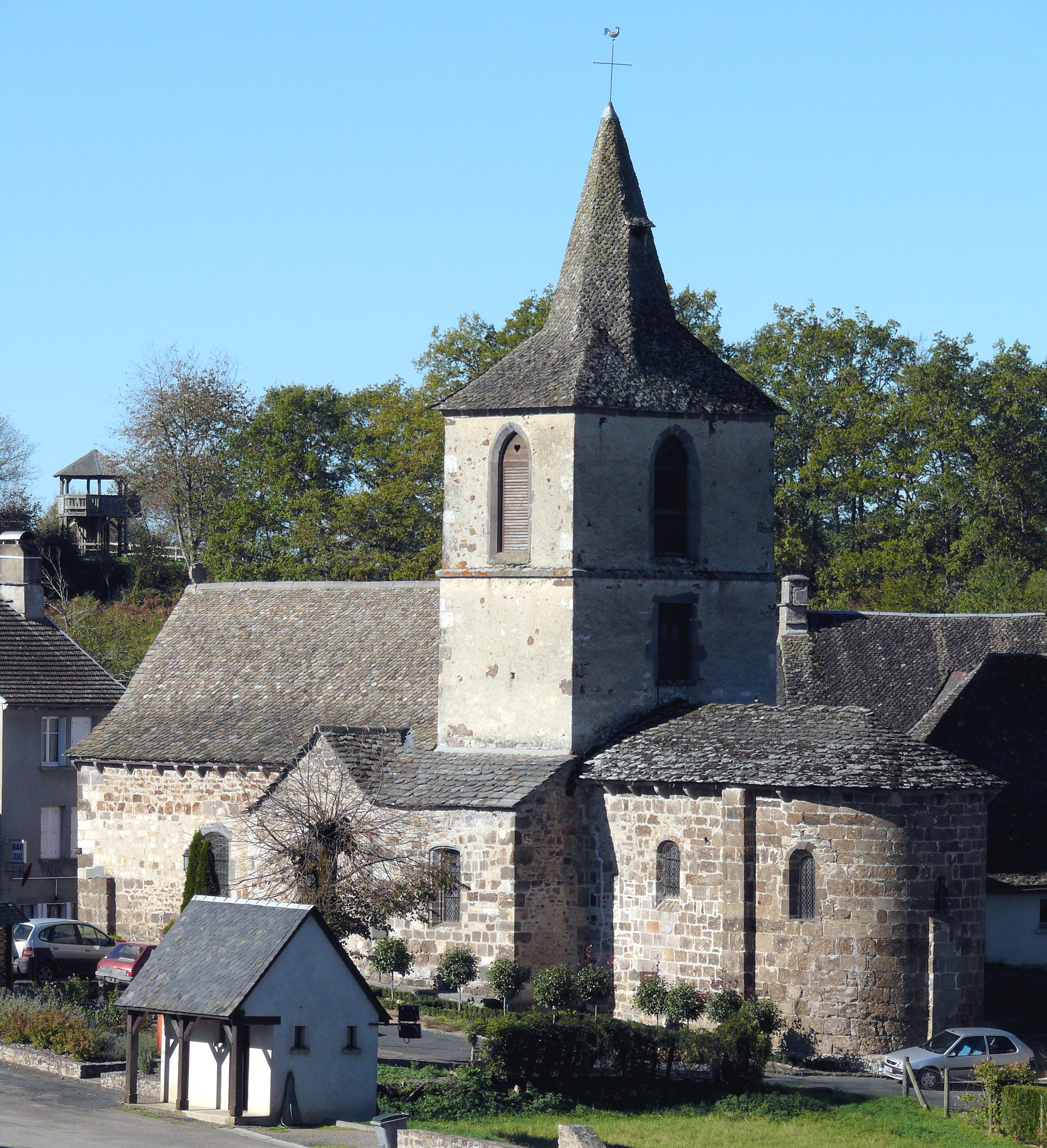 Chalvignac - Eglise Saint-Martin